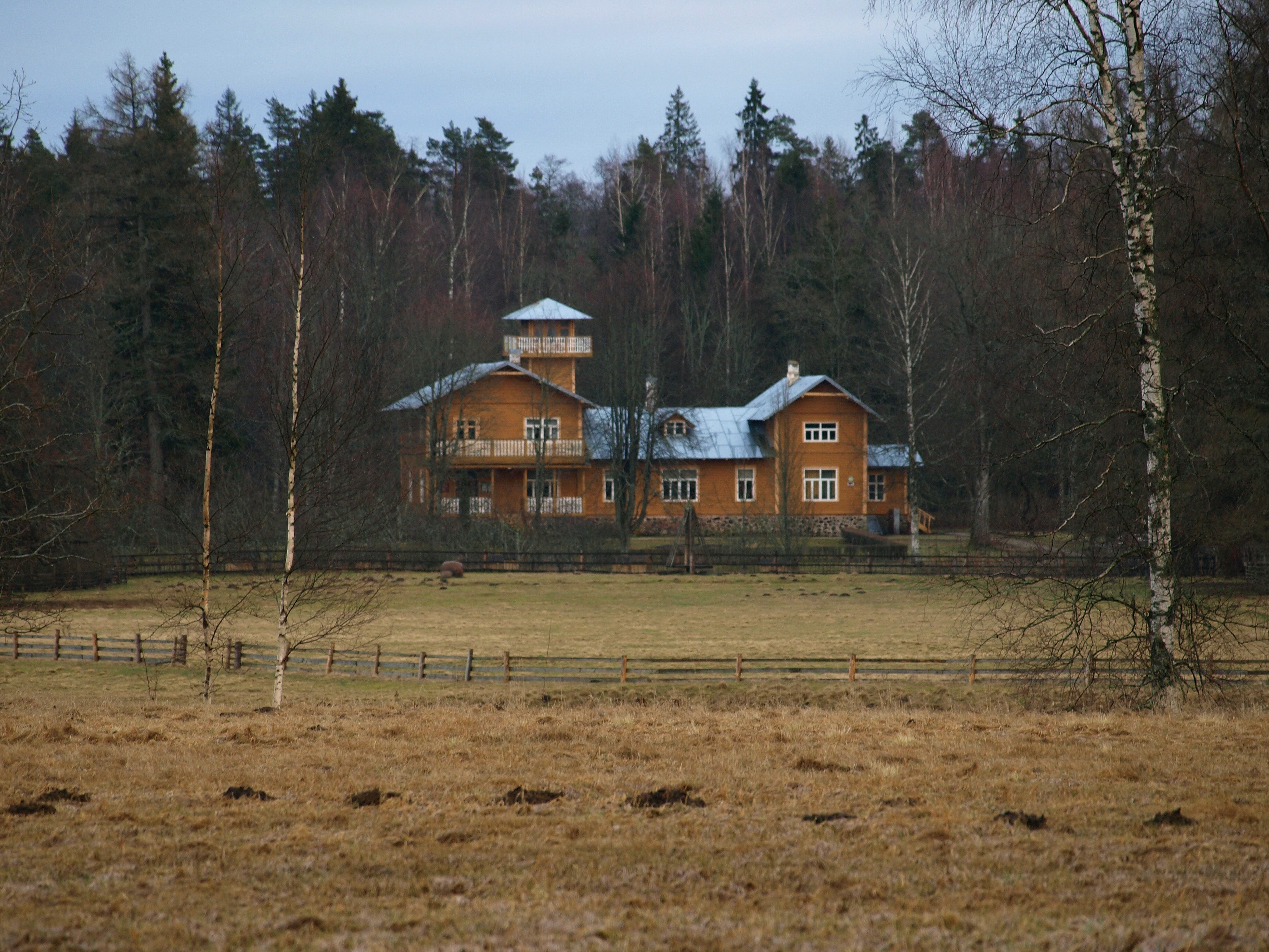 Kurgja talu, kus aastail 1874–1882 elas Carl Robert Jakobson